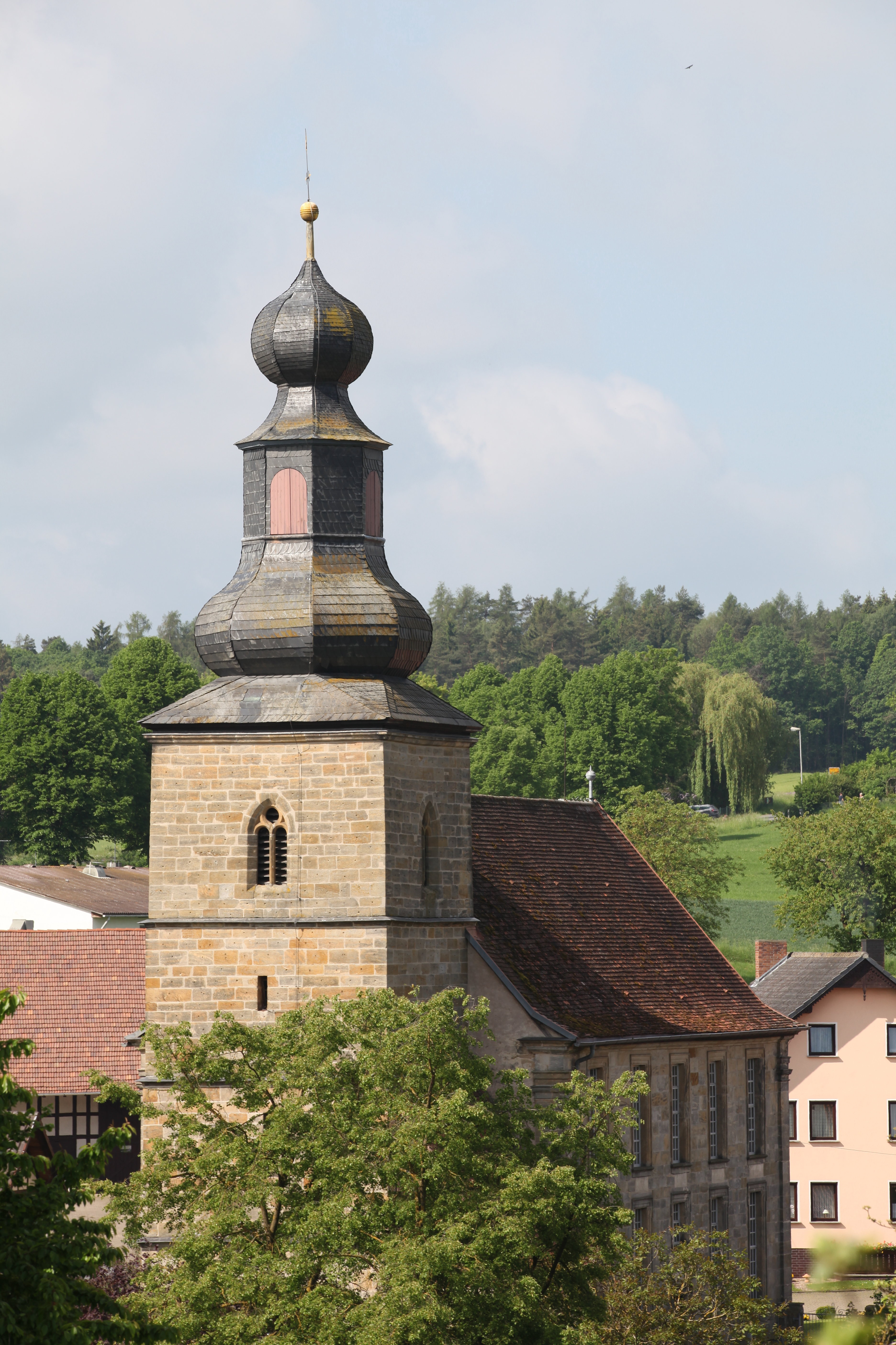 Nord-Ost-Ansicht, Evangelische Marienkirche in Watzendorf